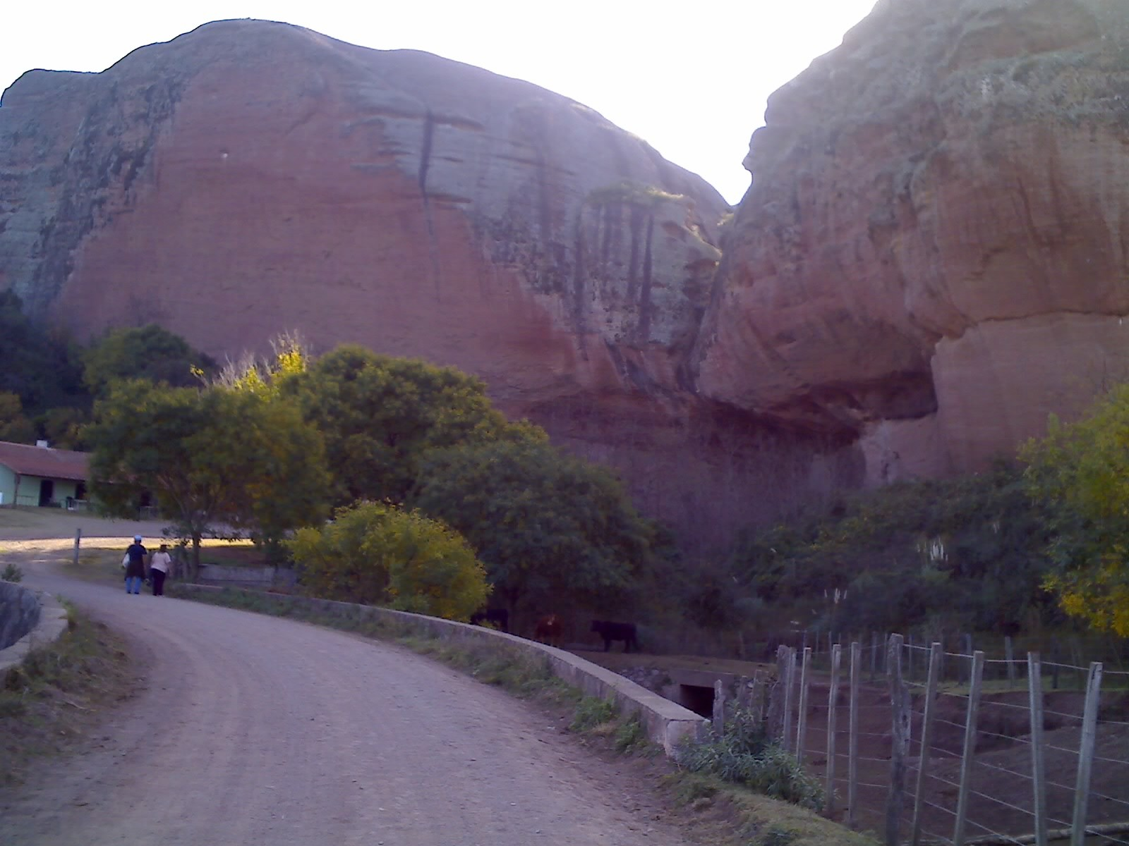 Cuevas de Ongamira, Provincia de Córdoba